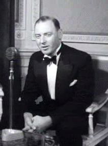 Frank Gillard, BBC-reporter.